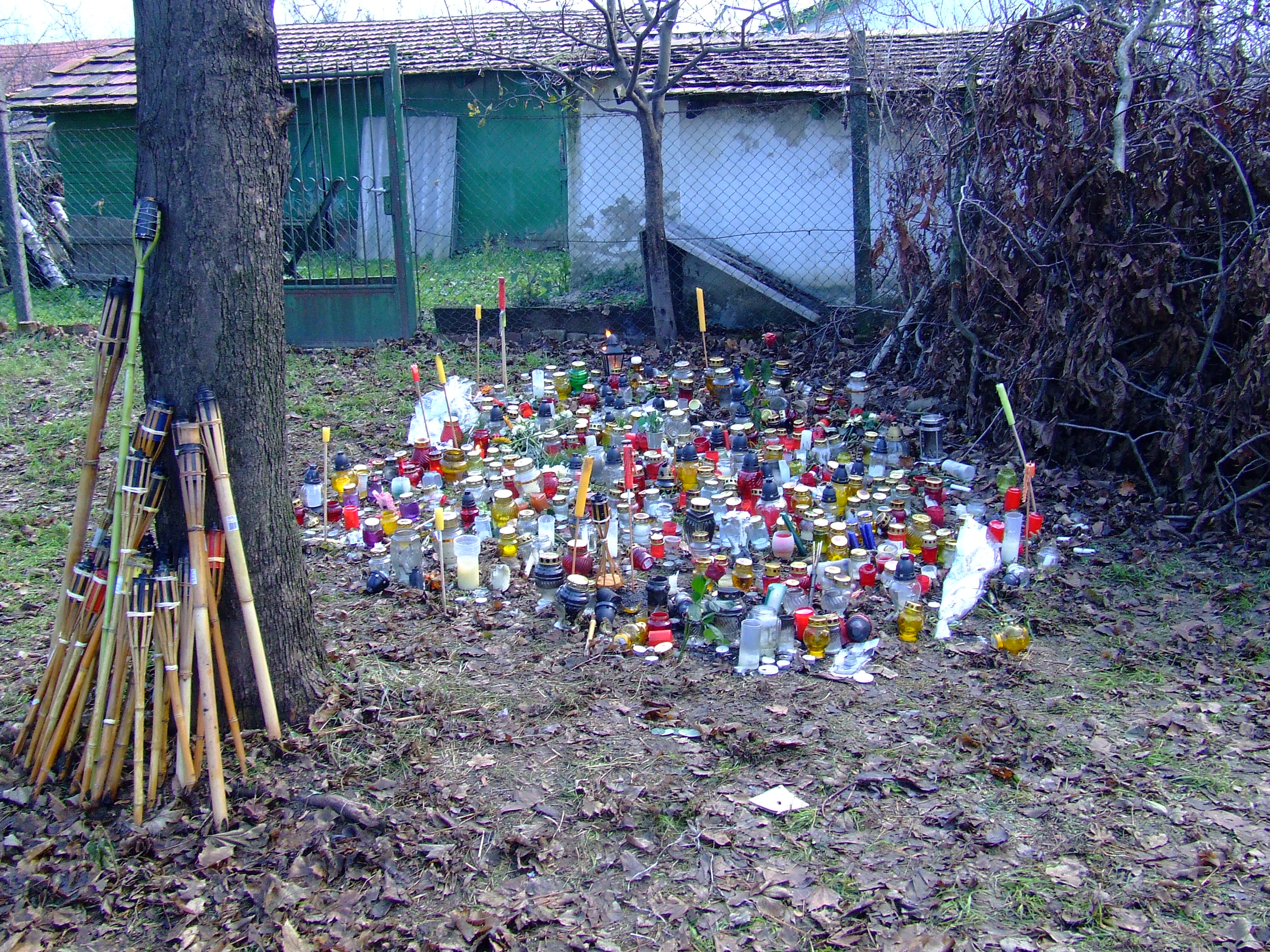 A meggyilkolt Horák Nóra holtteste megtalálásának helyszíne Kiskunlacházán (Pereg)